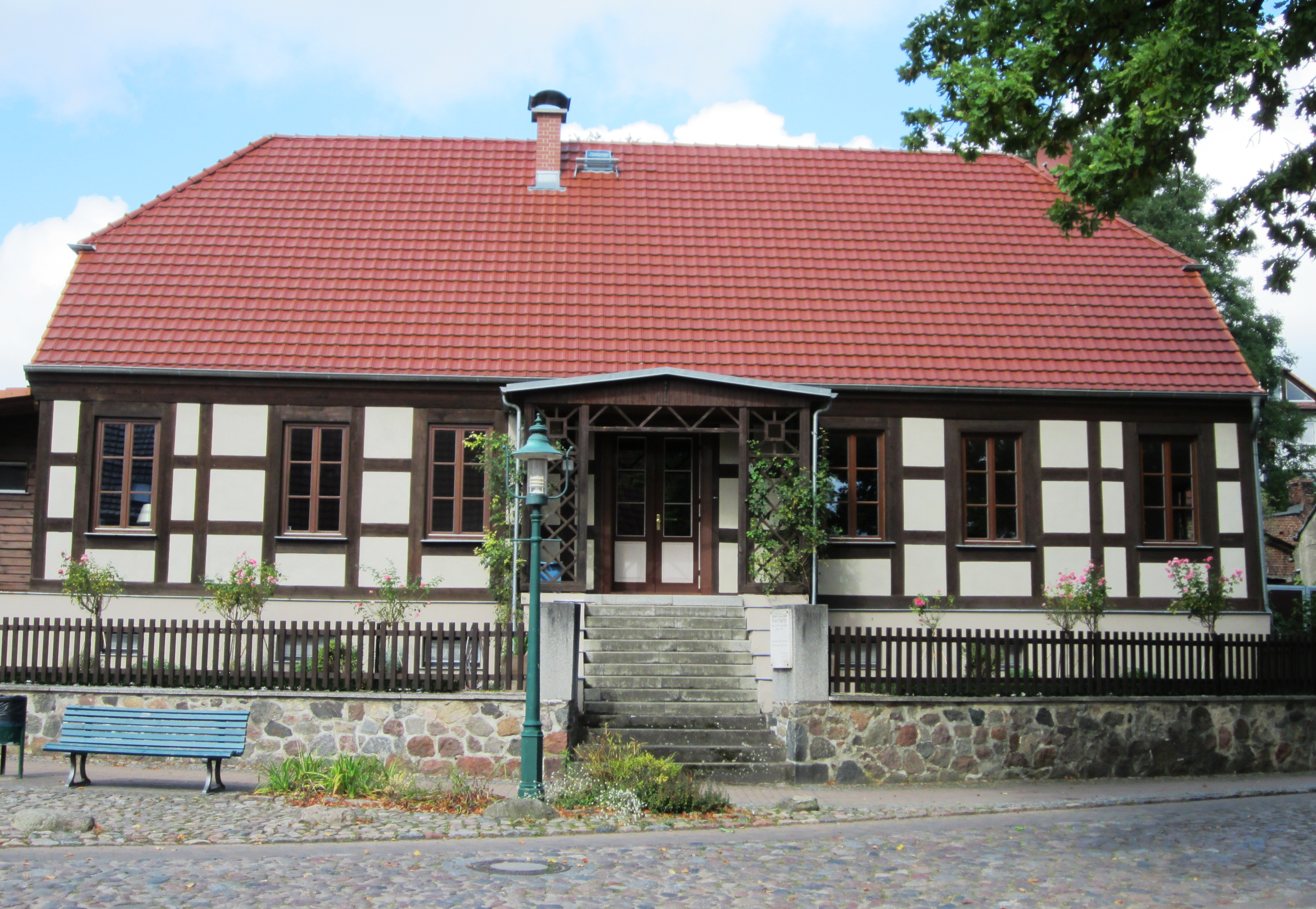 Wohnhaus Eduard Gärtners (1870-1877) in Flecken Zechlin, Am Markt 7